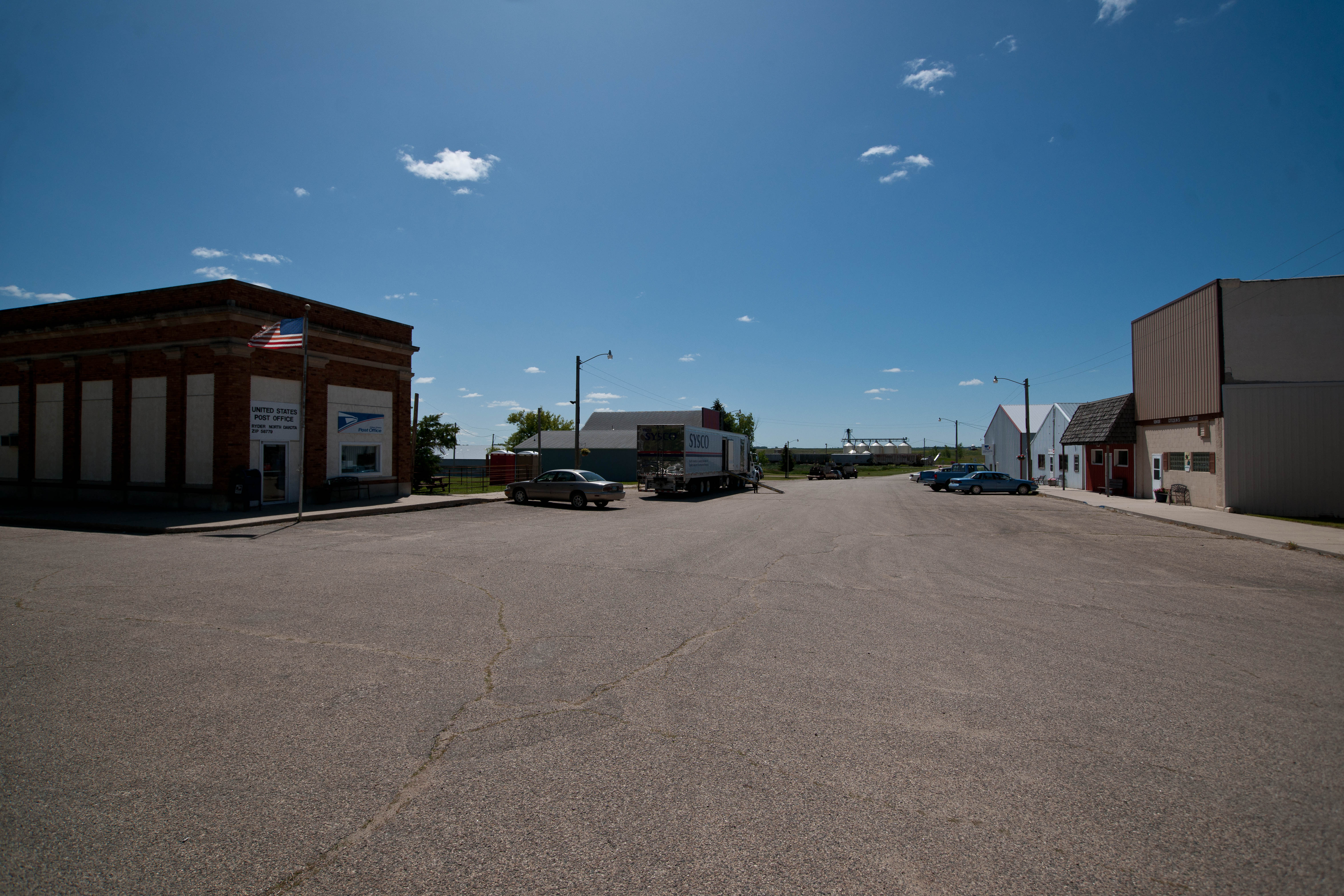 Ryder, North Dakota